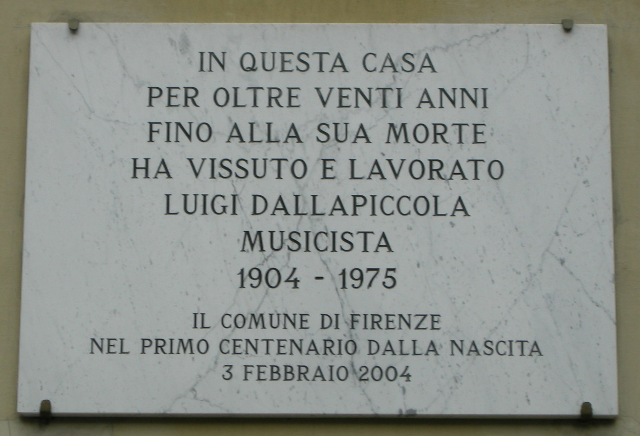 Via romana, targa a luigi dallapiccola